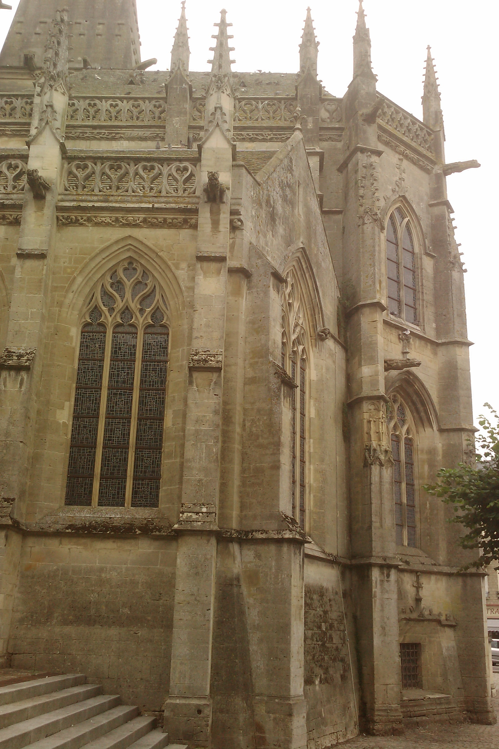 Église Saint-Malo de Valognes